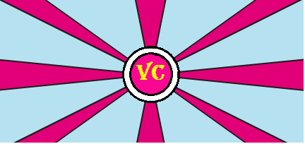 Bandera de la localidad de El Volcán